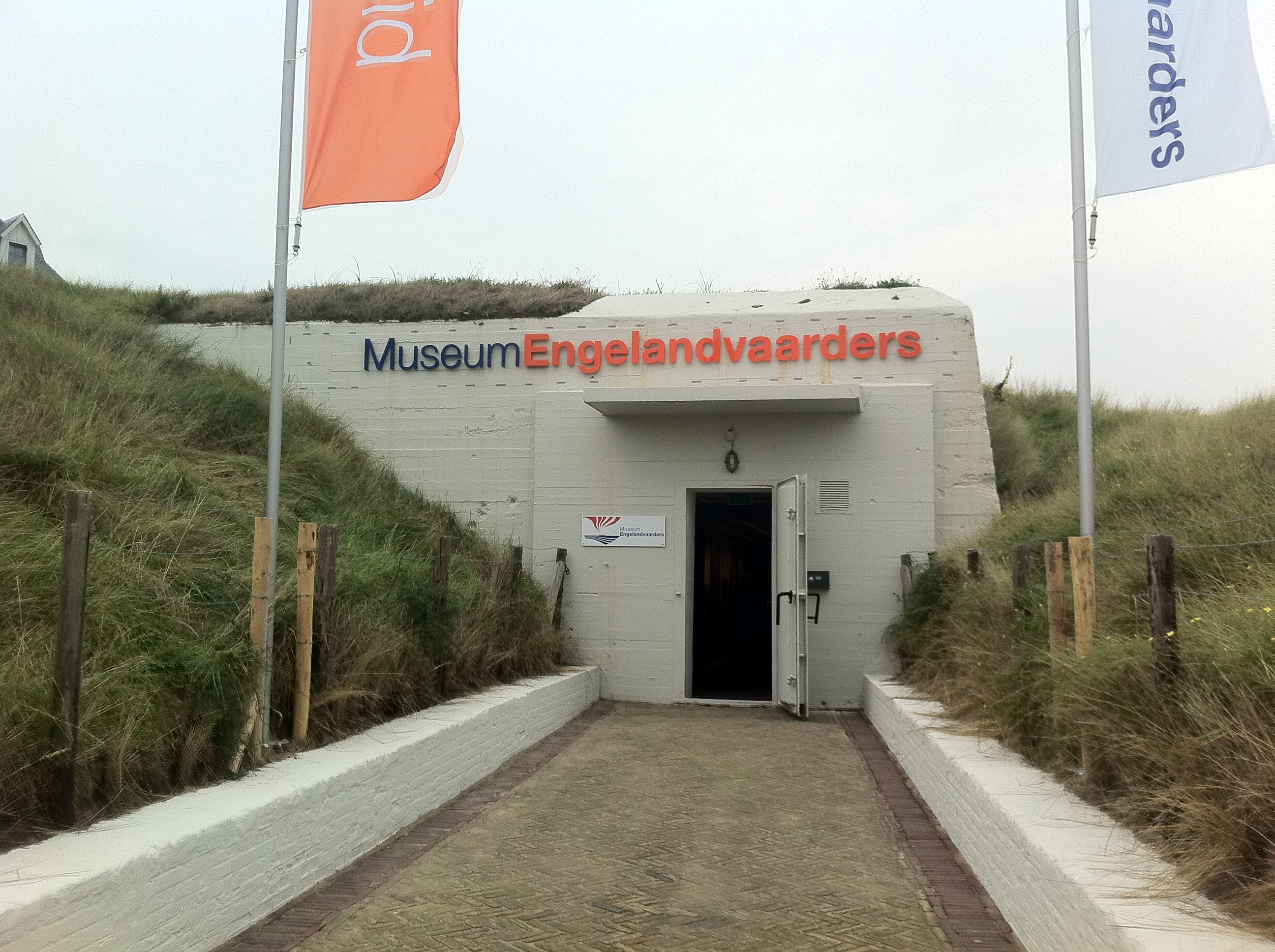 Ingang van Museum Engelandvaarders in Noordwijk